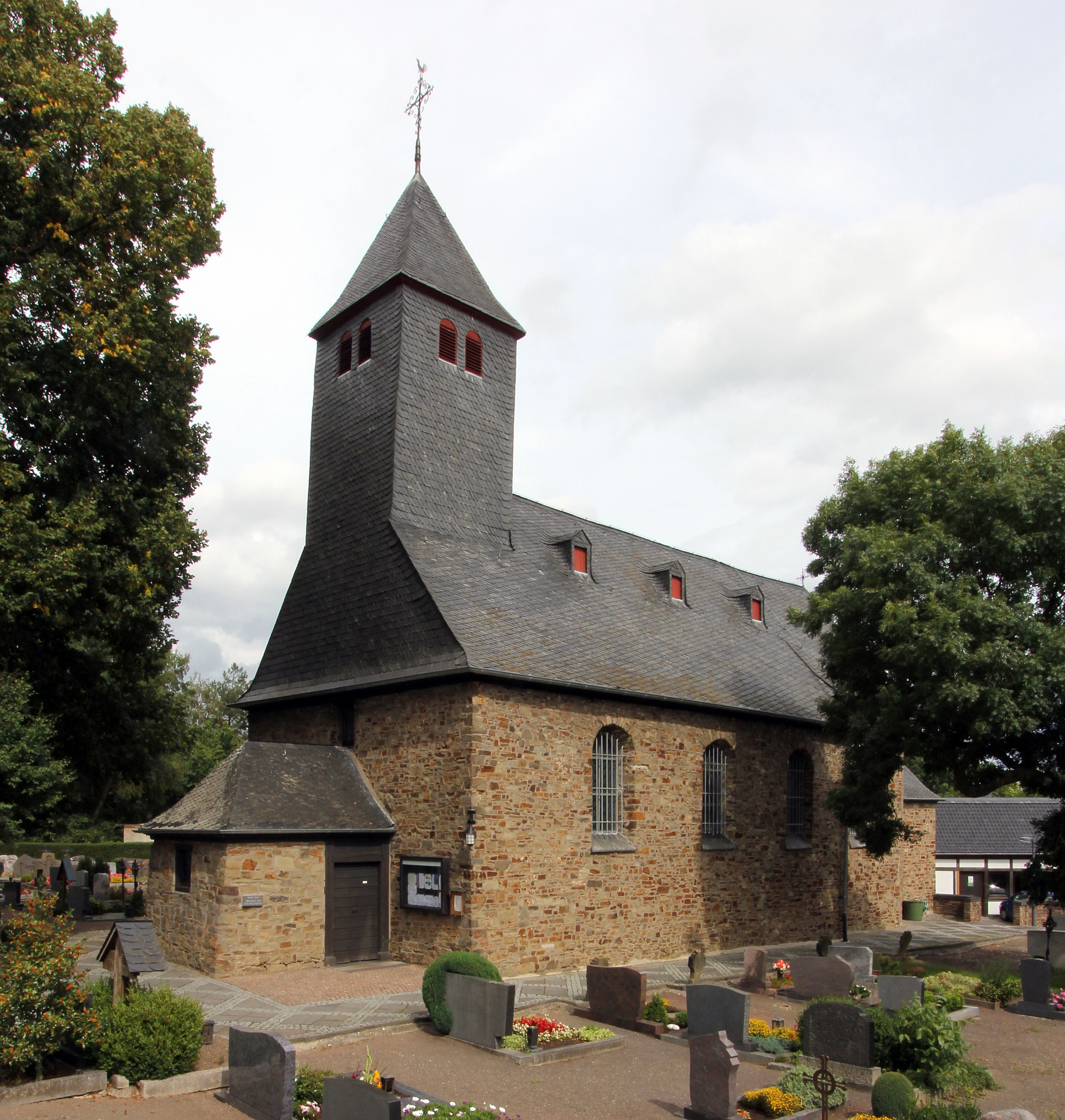 Rheinbach OT Hilberath, Eidbusch 8, Katholische Pfarrkirche St. Martin This is a photograph of an architectural monument.